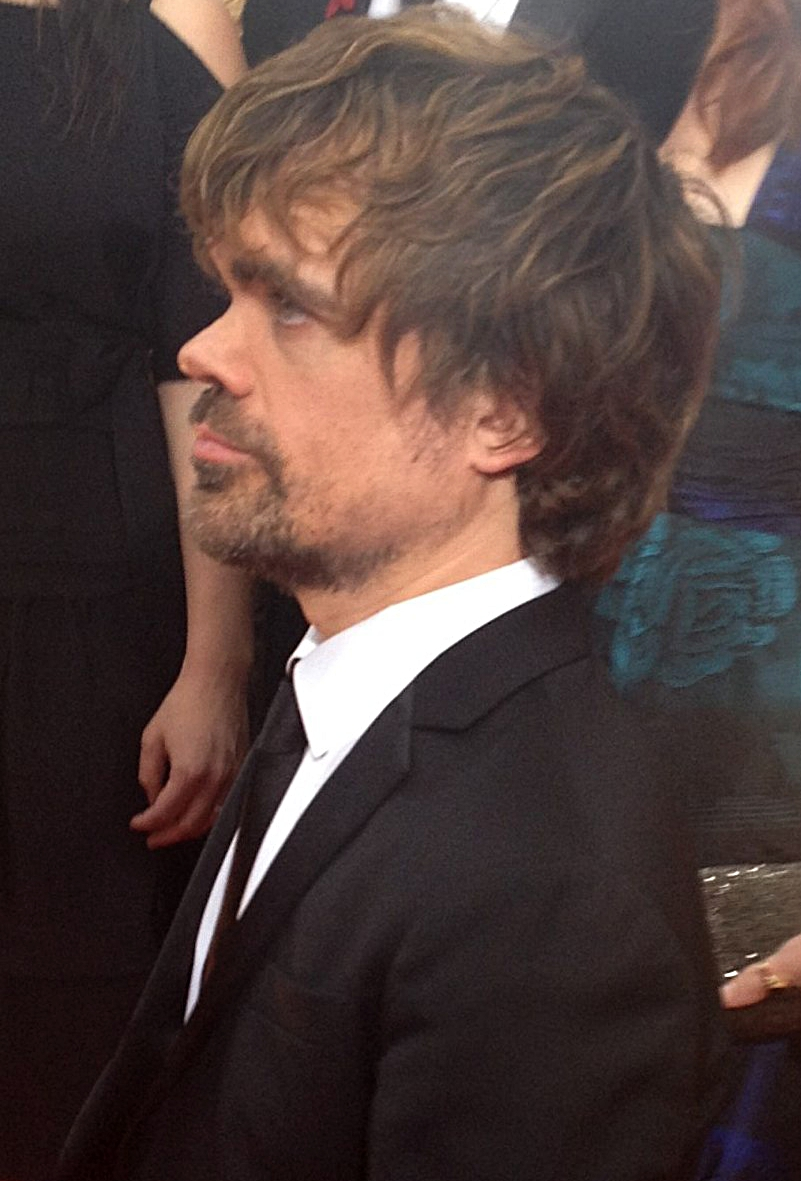 Peter Dinklage at 69th Annual Golden Globes Awards.